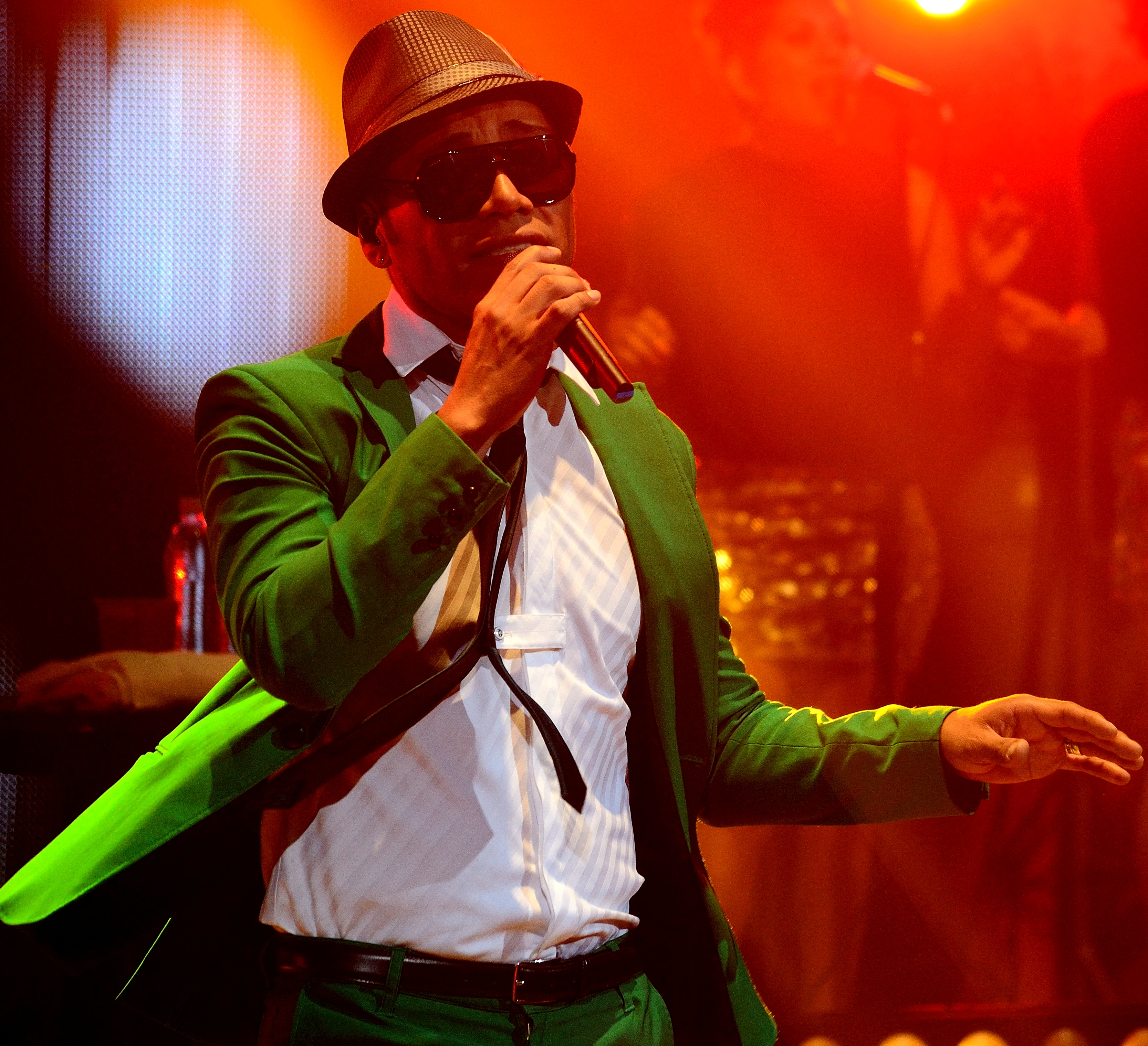 Samo durante el showcase otorgado en Centro Cultural Roberto Cantoral en la Ciudad de México como parte de la promoción de su álbum Inevitable.